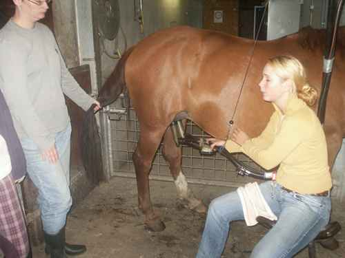 Paardenmelkerij